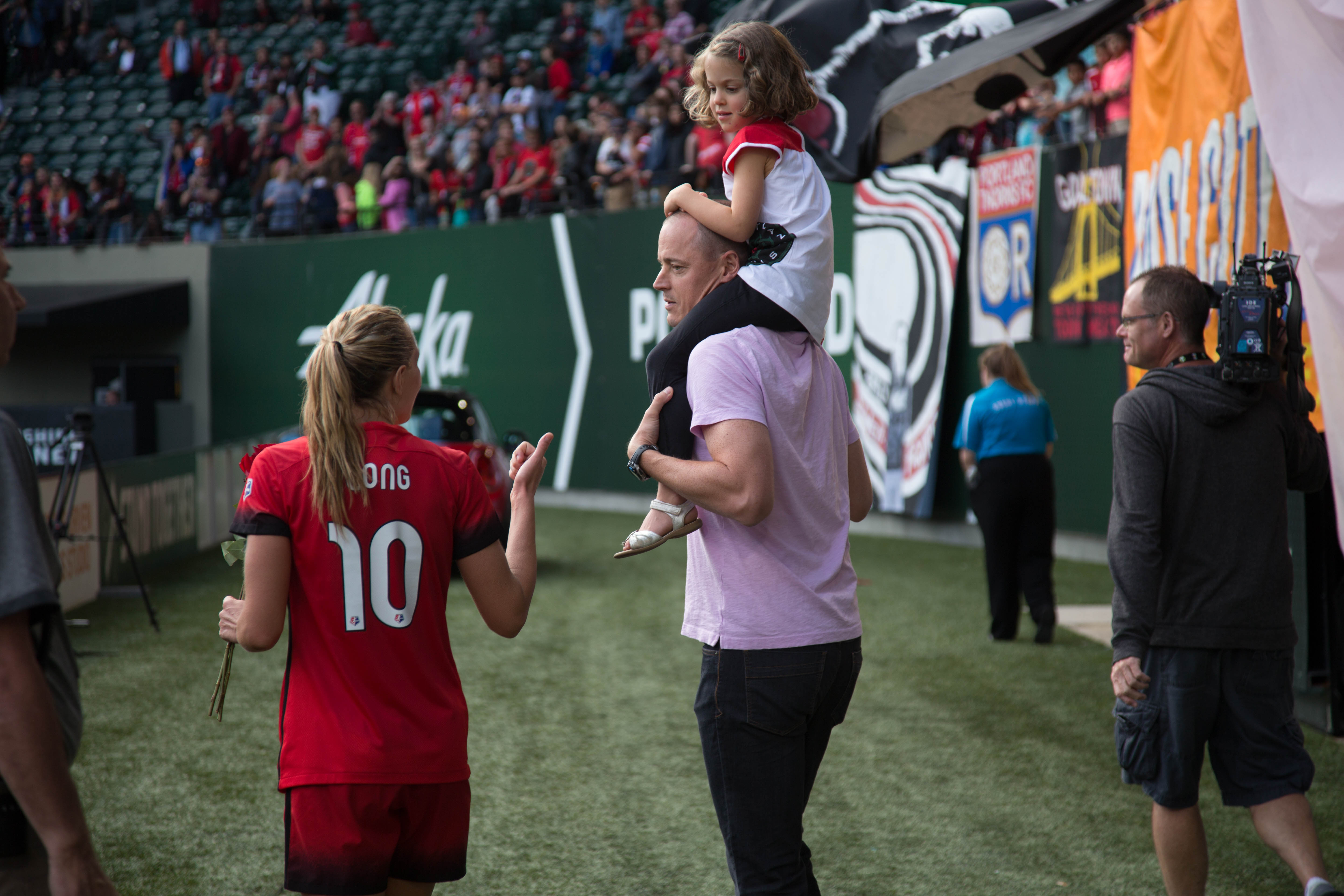 N42A3253.jpg